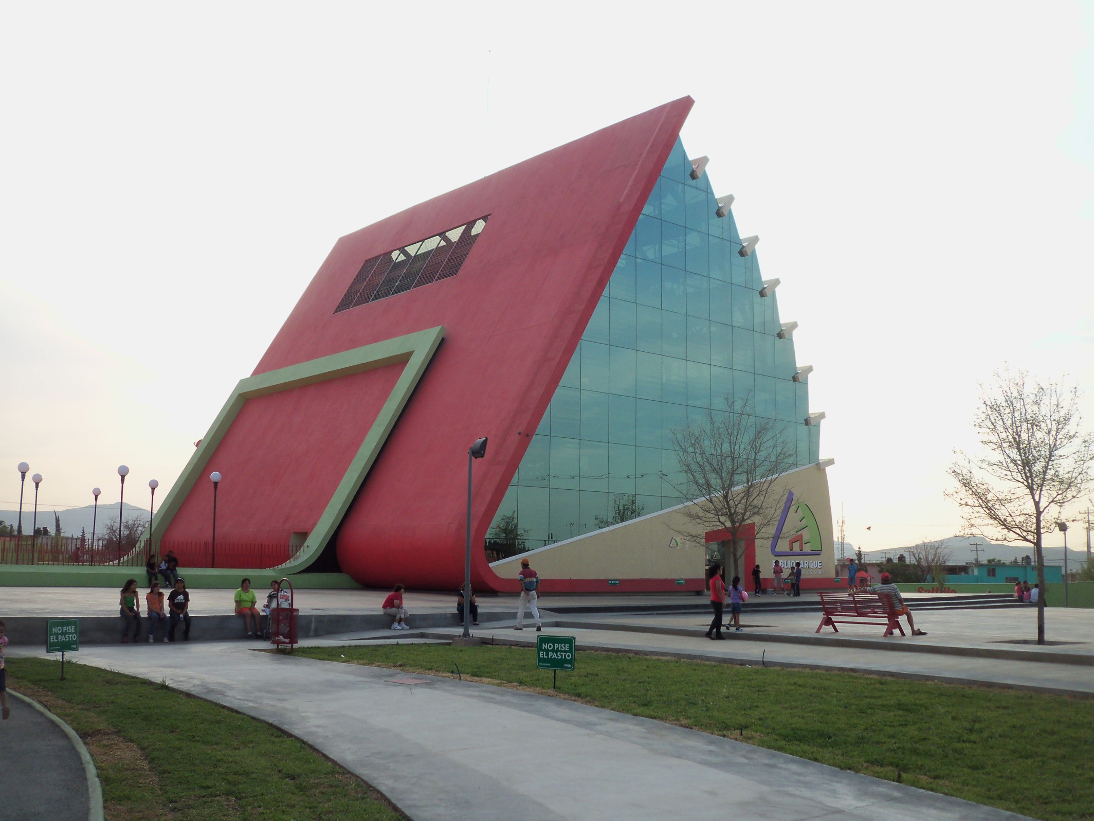 BIBLIOPARQUE SUR, saltillo coahuila Mexico, vista desde la entrada